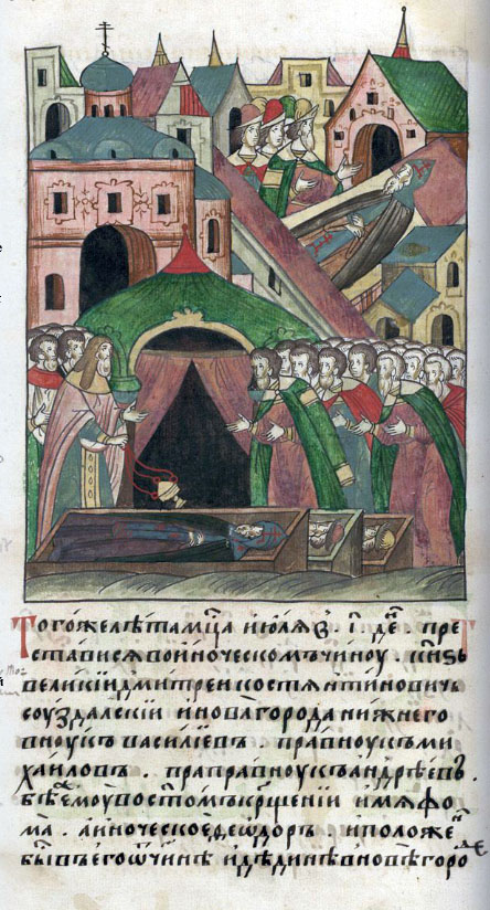 ЛИЦЕВОЙ ЛЕТОПИСНЫЙ СВОД: Тем же летом, месяца июля в 10-й день, преставился в иноческом чину князь великий Дмитрий Константинович Суздальский и Новгорода Нижнего, внук Васильев, правнук Михайлов, праправнук Андреев; было же ему во святом крещении имя Фома, а иноческое — Феодор. И положен был в его отчине и дедине, в Новгороде